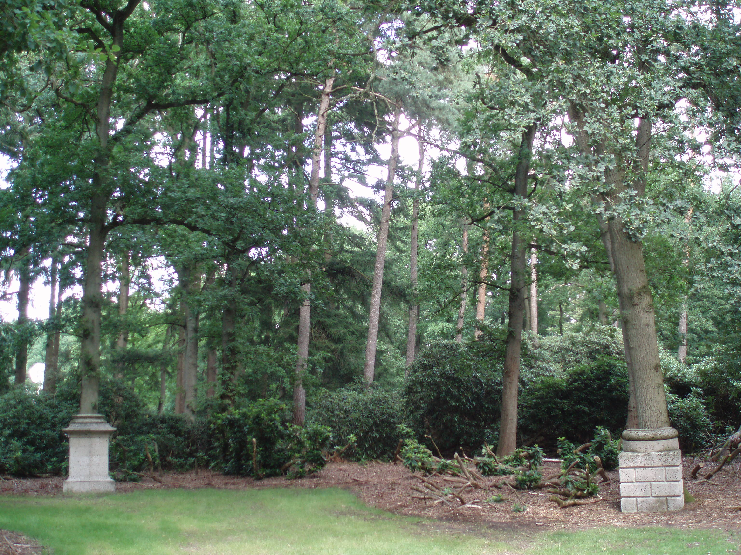 Kunstwerk van Ian Hamilton Finlay in de beeldentuin van het Kröller-Müller Museum.